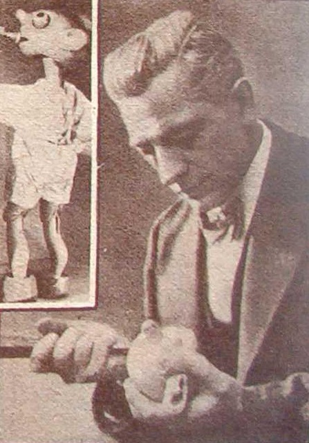 Augustin Nosek, český loutkář